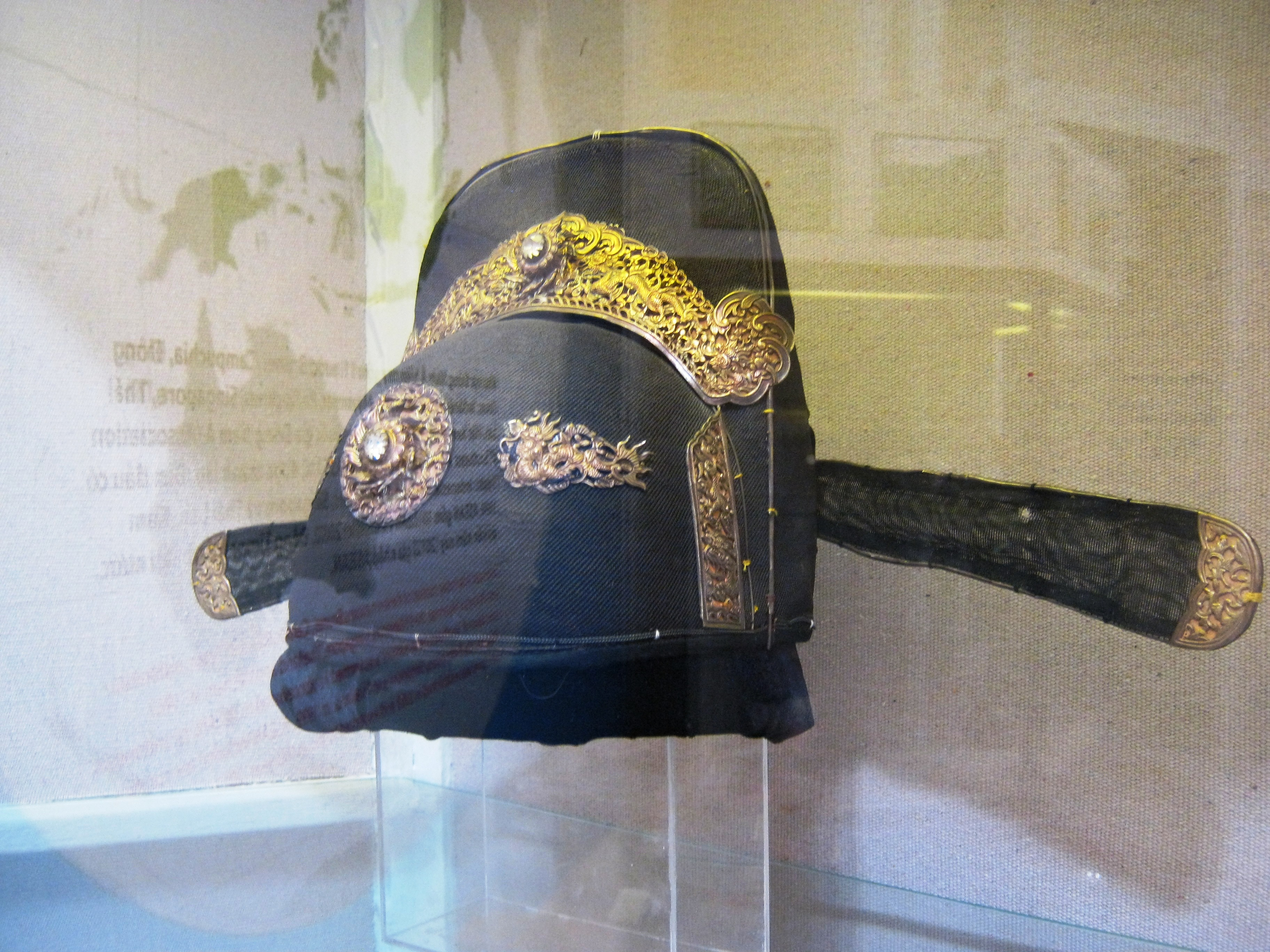 Mão cánh chuồn trong vương triều nhà Nguyễn ở thế kỷ 19, được làm bằng kim loại và lông đuôi ngựa. Hiện vật đang đang được trưng bày trong Bảo tàng Lịch sử Việt Nam (Thành phố Hồ Chí Minh).